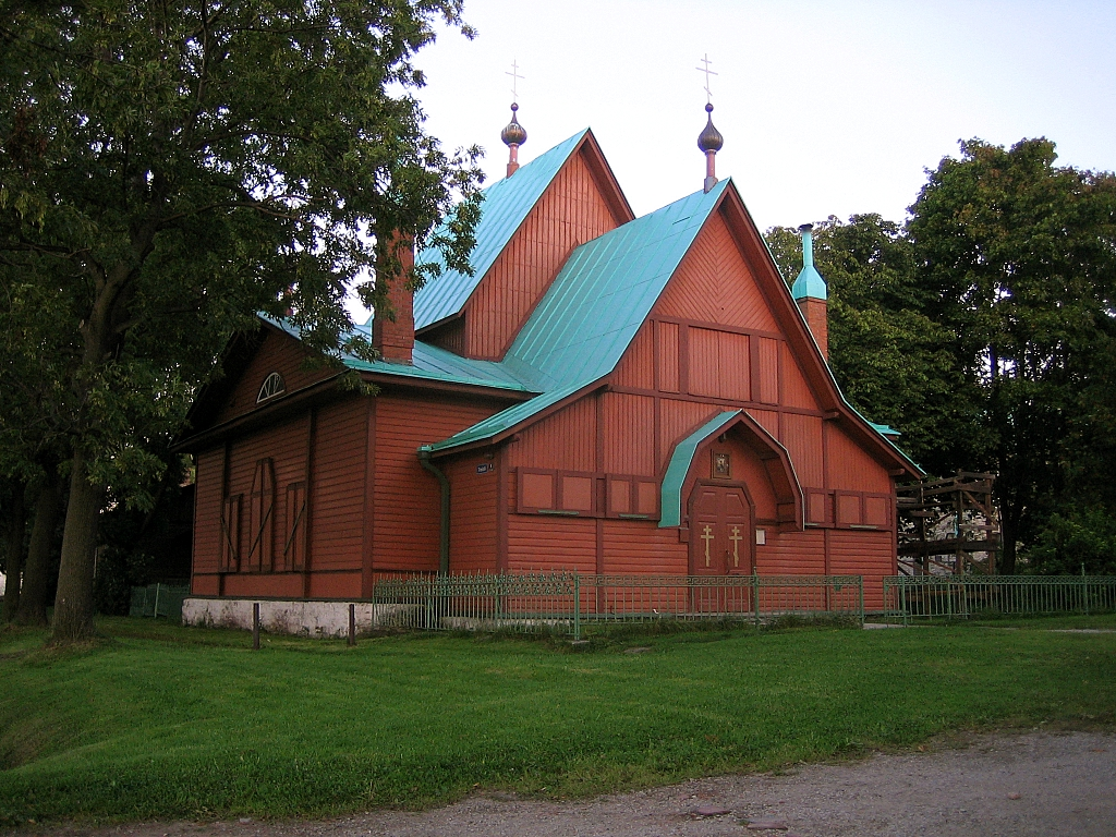 Tallinna Püha piiskop Nikolause kirik Koplis.